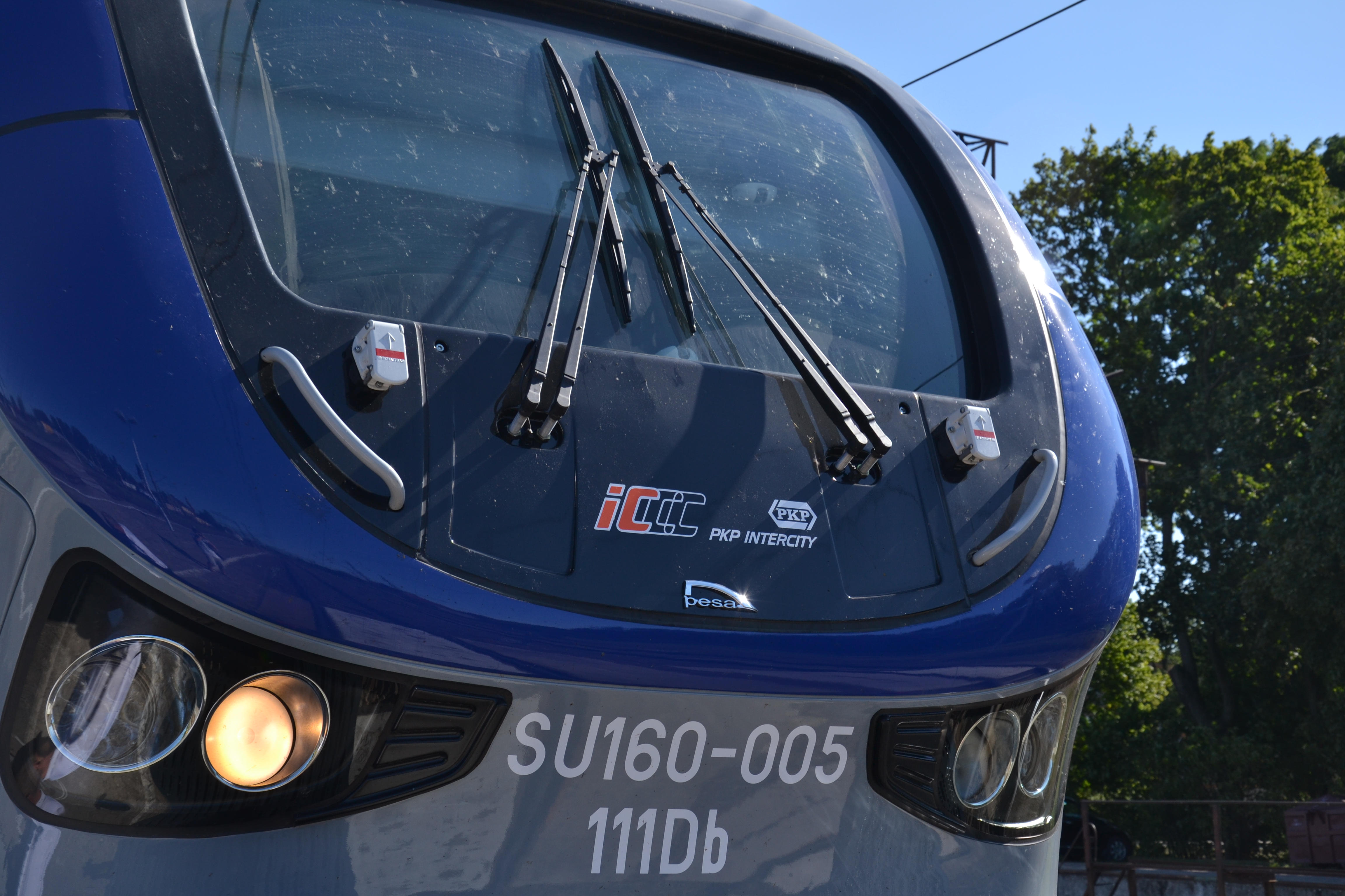 Zbliżenie na czoło SU160-005 This photo was taken during Railway Wikiexpedition 2015 set up by Wikimedia Polska Association in cooperation with Fundacja Grupy PKP. You can see all photographs in category Wikiekspedycja kolejowa 2015.